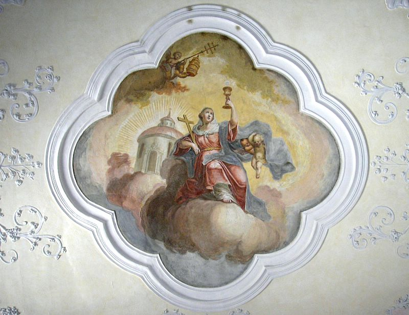 Bad Bayersoien (Landkreis Garmisch-Partenkirchen, Oberbayern). Pfarrkirche St. Georg. Fresko im Langhaus (um 1780) . Eigene Aufnahme, Mai 2007 / Bad Bayersoien (Upper Bavaria, Germany). Parish church St. George. Fresco (Nave, ca. 1780). Own photo, May 2007